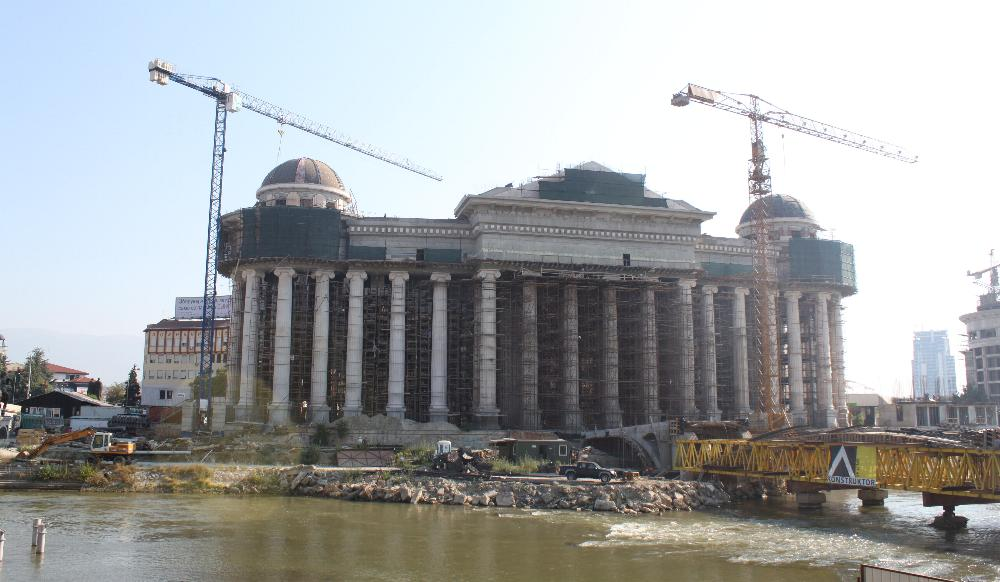 Großbaustelle in der Innenstadt, Projekt Skopje 2014